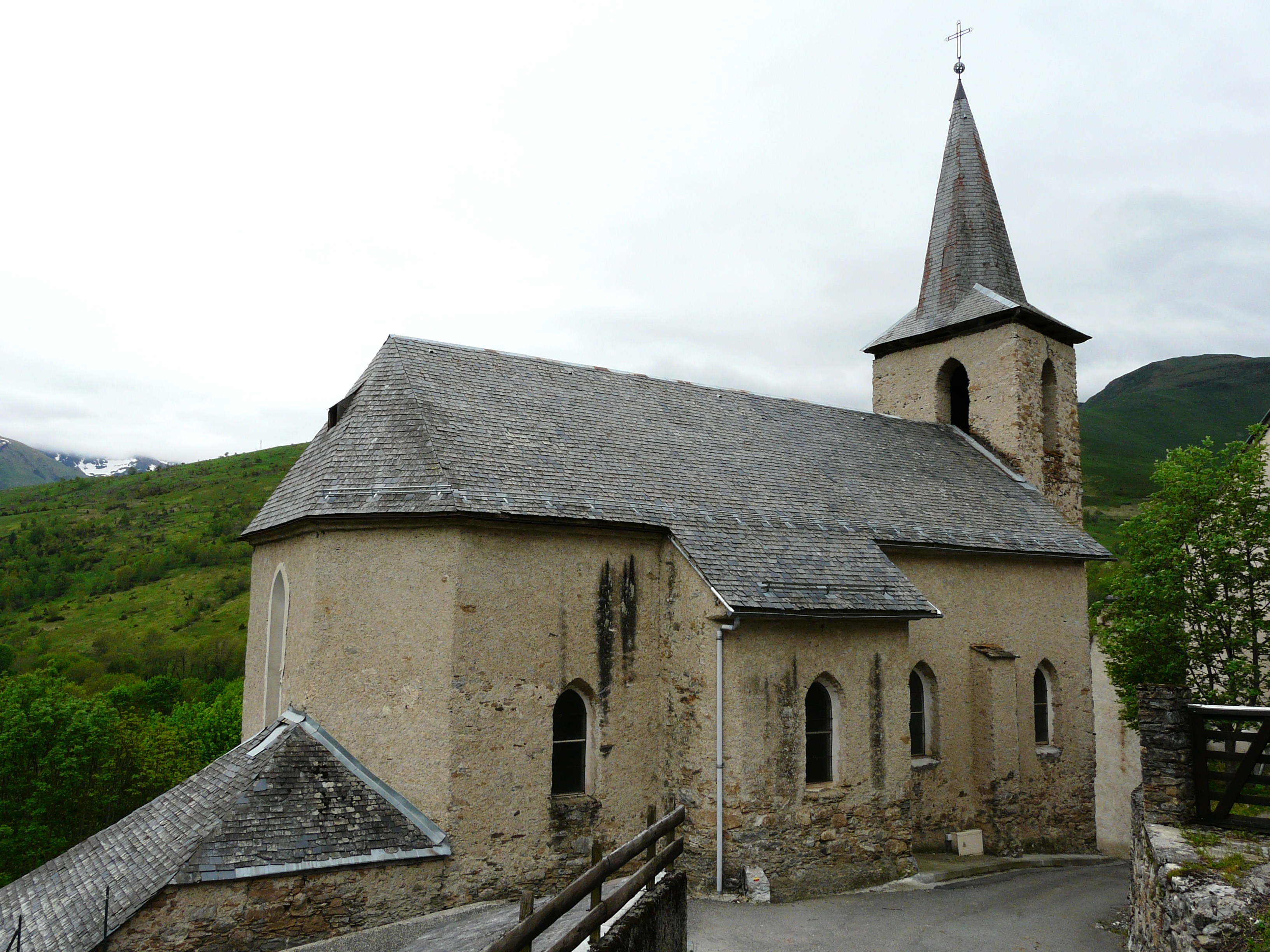 L'église de Portet-de-Luchon, Haute-Garonne, France.